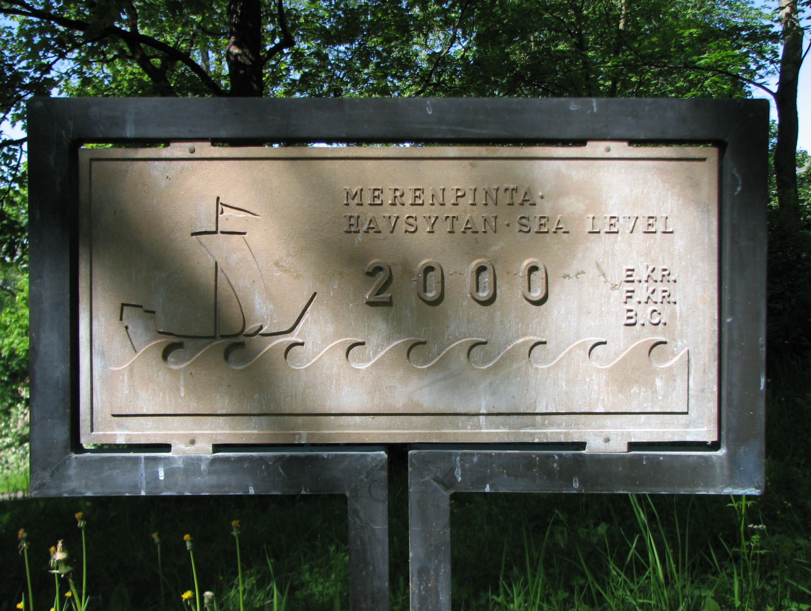 A plaque indicating sea level decline in Vartiovuori, Turku, Finland